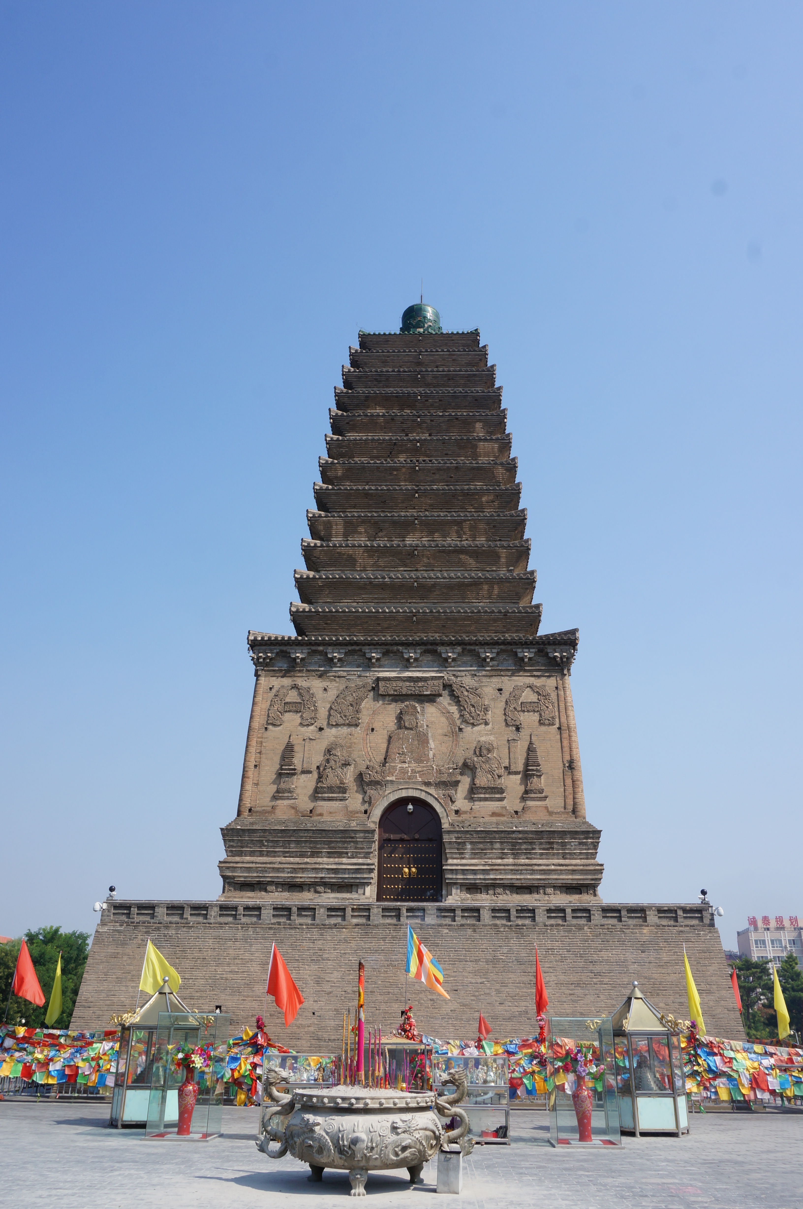 朝阳北塔，南侧。